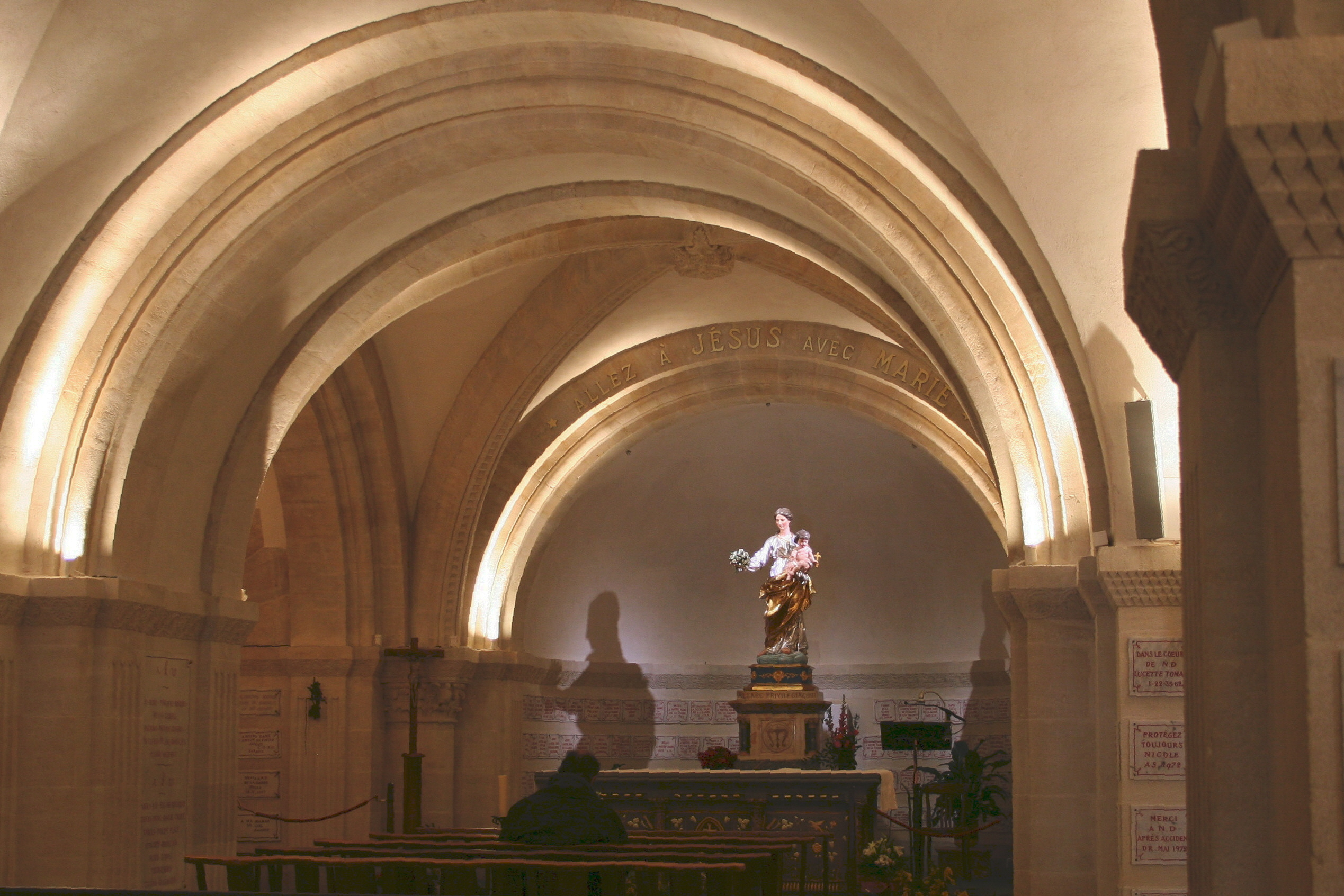 crypte de la basilique Notre-Dame de la Garde.